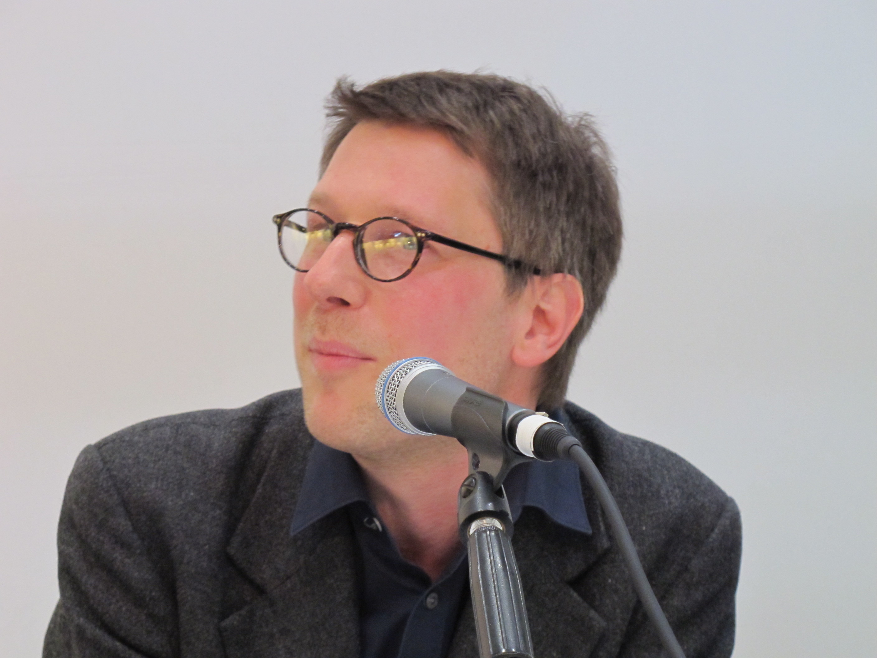 Leipziger Buchmesse 2014, Jan Wagner